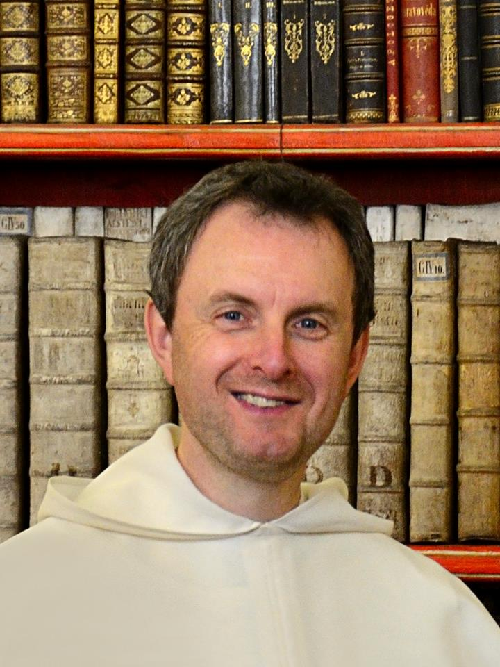 P. Vladimír Slámečka, rektor Duchovní správy akademické obce ČVUT v Praze, v knihovně strahovského kláštera.